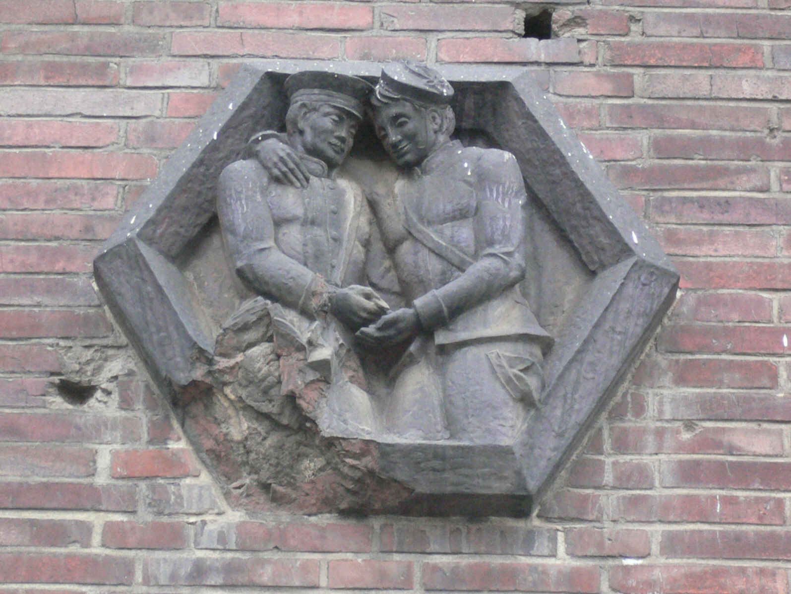 Zirkel